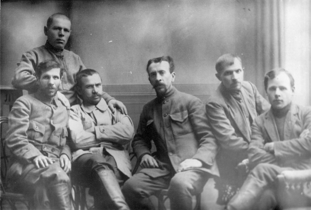 Пермские большевики после убийства великого князя. Сидят (слева направо) Н.В. Жужгов, Г.И. Мясников, В.А. Иванченко, И.Ф. Колпащиков, В.А. Дрокин; стоит сзади А.В. Марков (1918)